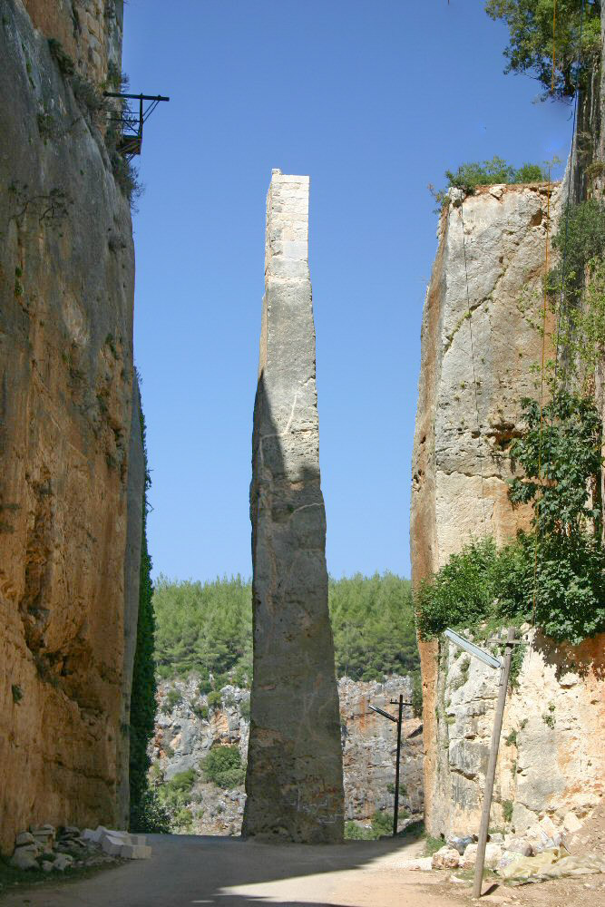 Burggraben mit Felsnadel als Brückenauflage eigenes Foto von 2004 public domain Mewes 07:08, 14. Apr 2005 (CEST)